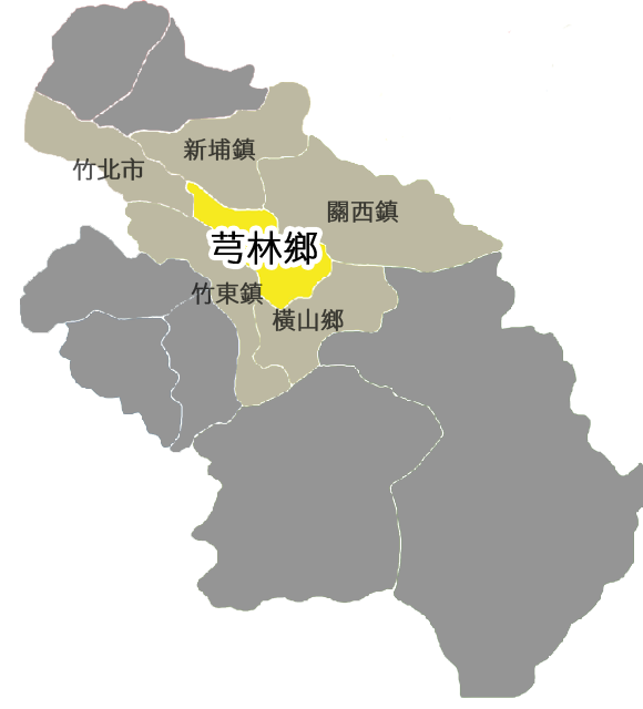 芎林鄉相對位置。